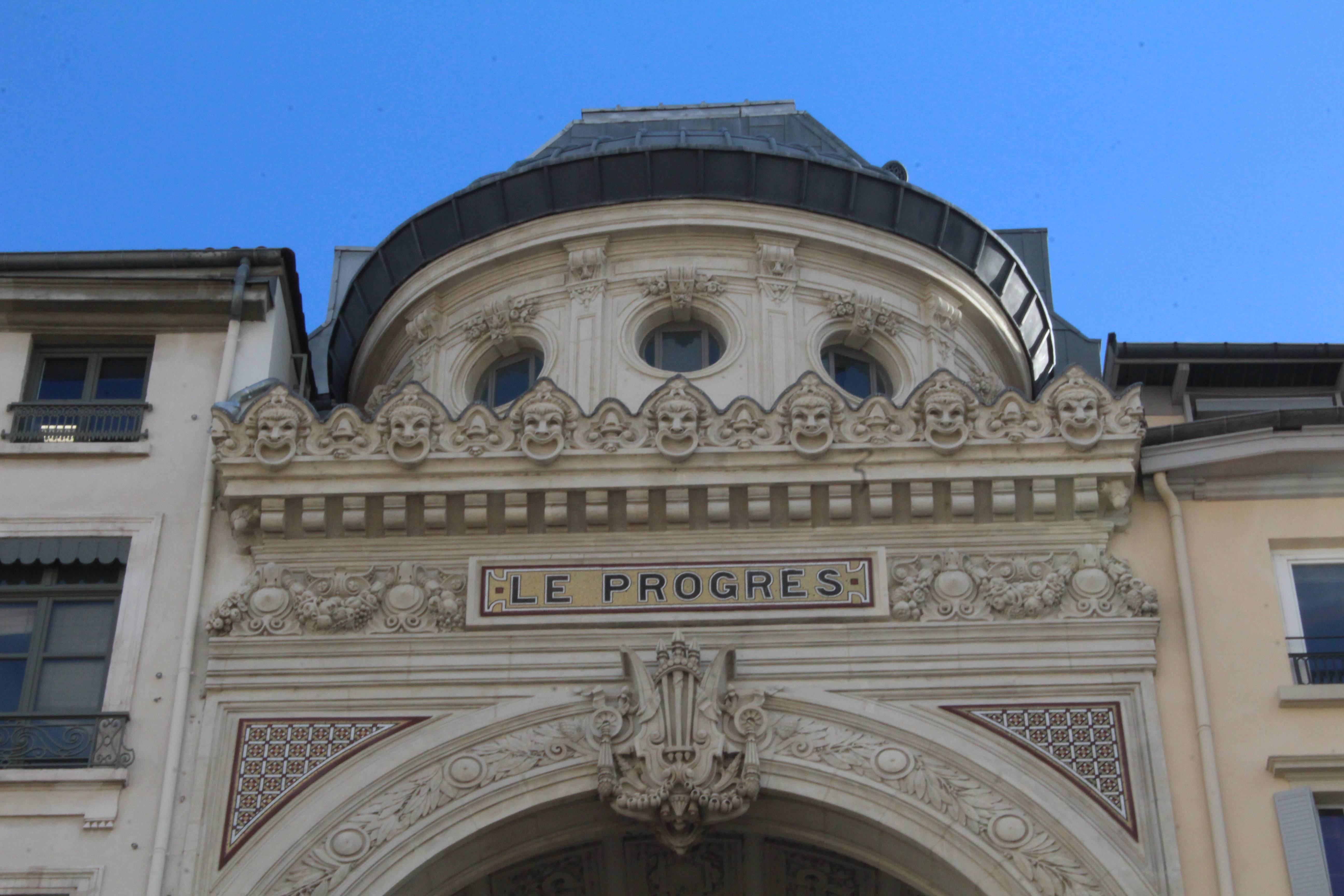 Ancien siège du Progrès, Lyon.